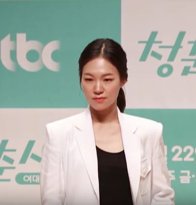 jtbc 금토 드라마 청춘시대-제작발표회 현장